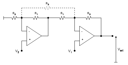 Schéma d'un amplificateur d'instrumentation à 2 AOP - je suis l'auteur